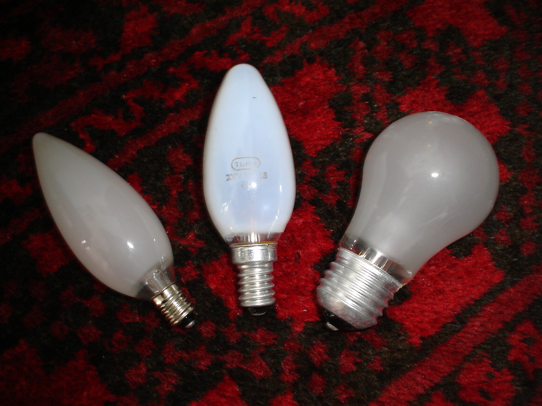 Glødepærer med med forskellige fatninger: E10, E14 og E27. De to sidstnævnte er købt i Danmark. E10 er en 40 watts glødepære fra Kina og den er svær at finde i Danmark.